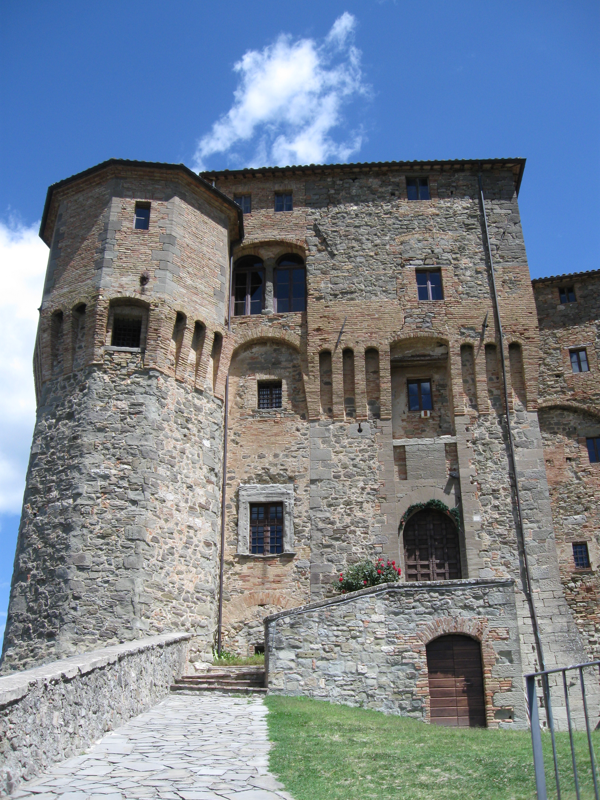 La rocca Fregoso di Sant'Agata Feltria (RN) - 01